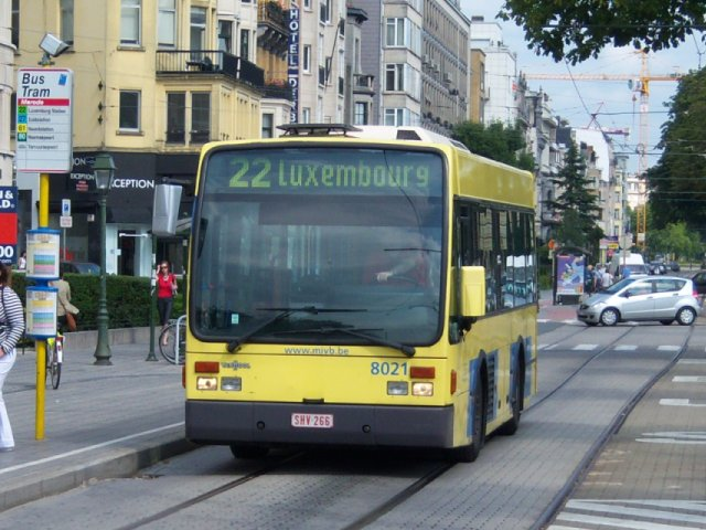 Van Hool A500.